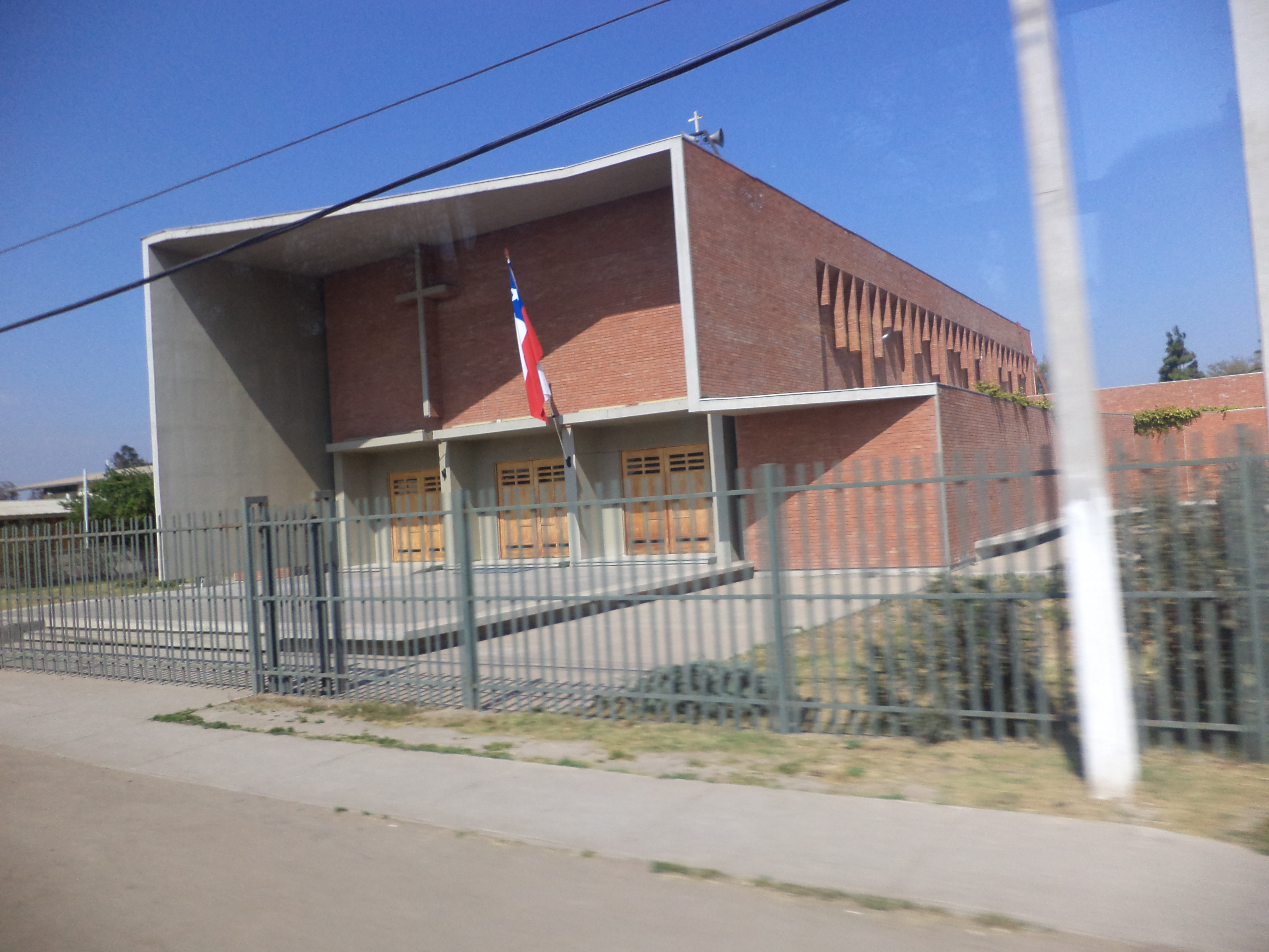 Iglesia Católica en Batuco, comuna de Lampa, provincia de Chacabuco, Chile